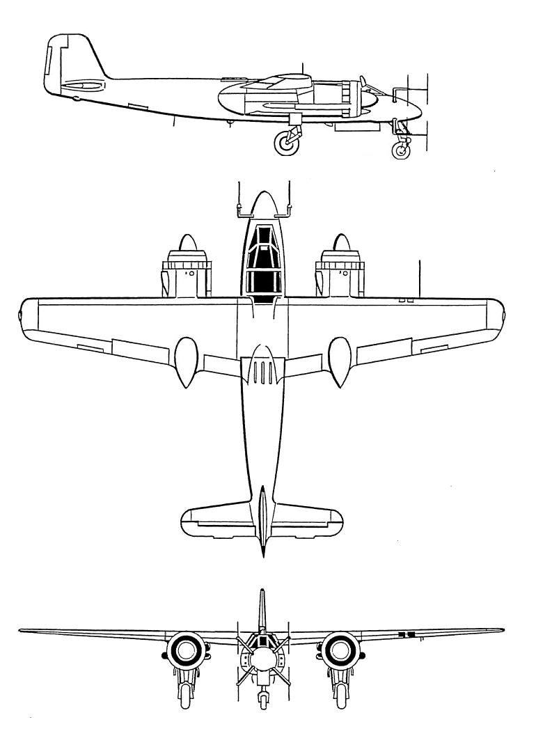 Profil der Focke-Wulf Ta 154 Seitenprofil